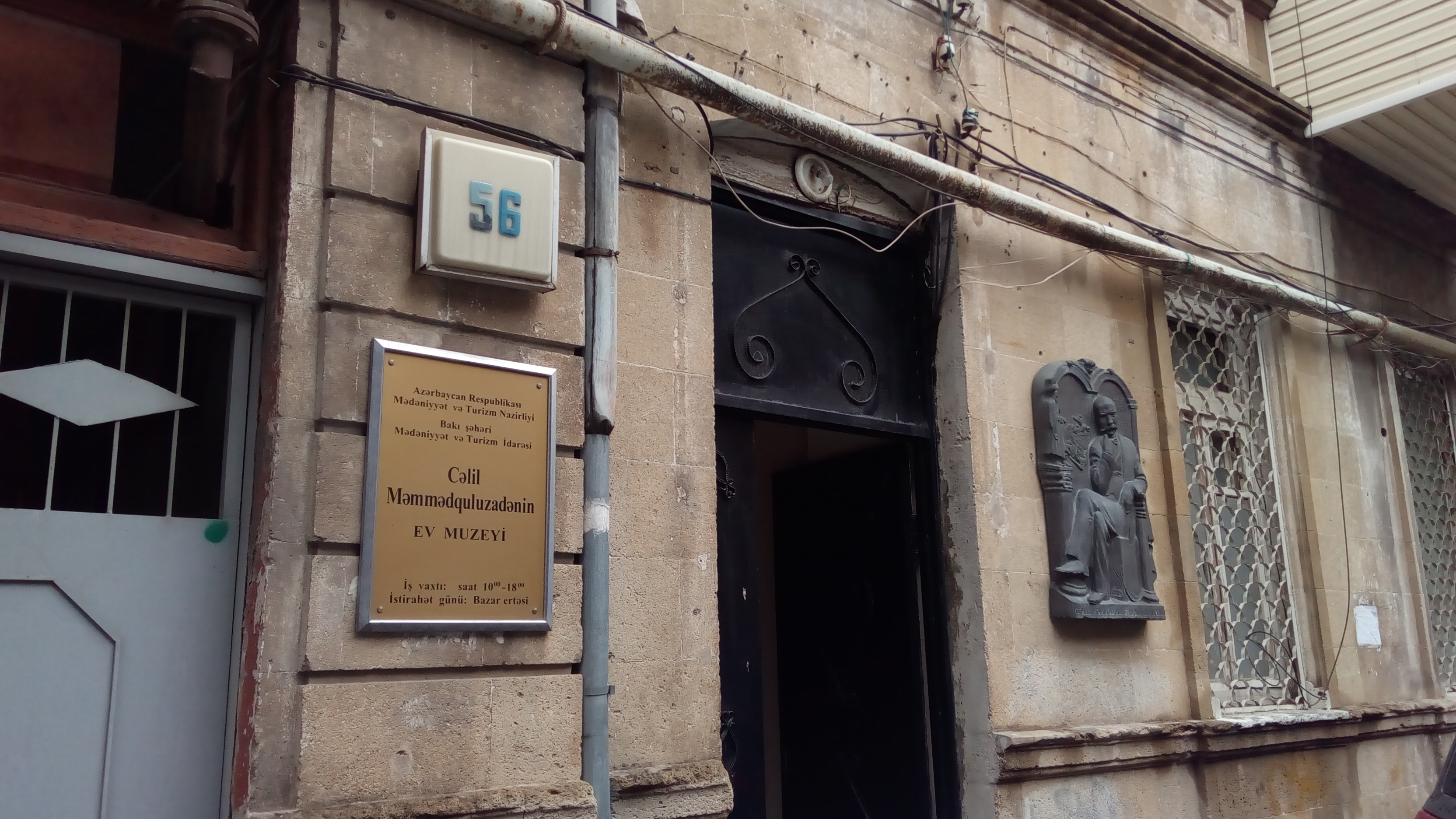 Cəlil Məmmədquluzadənin Ev Muzeyi